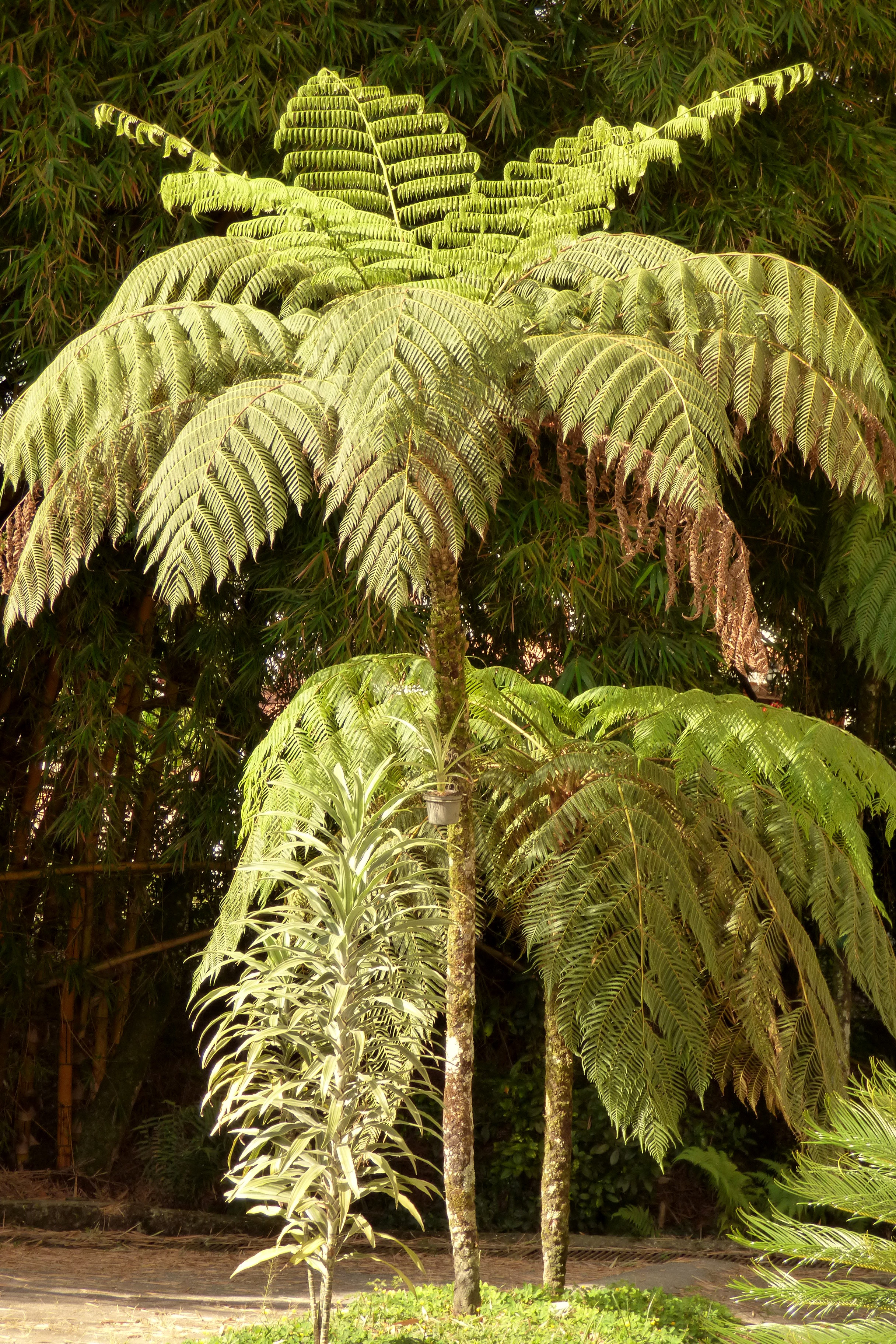 Sarro - Palma boba (Cyathea microdonta)